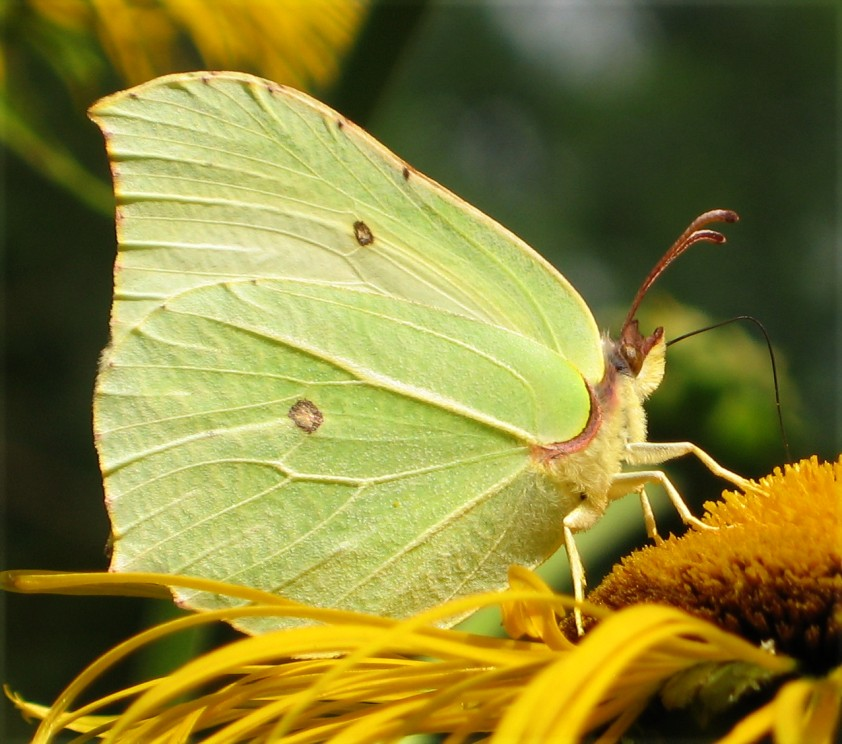 Ein Zitronenfalter (Gonepteryx rhamni)